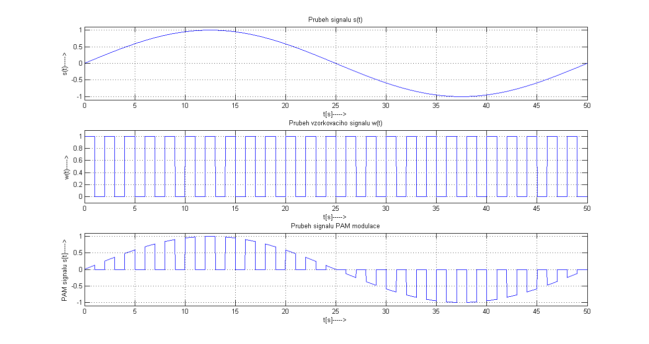 Demonstrace vzniku PAM signálu.